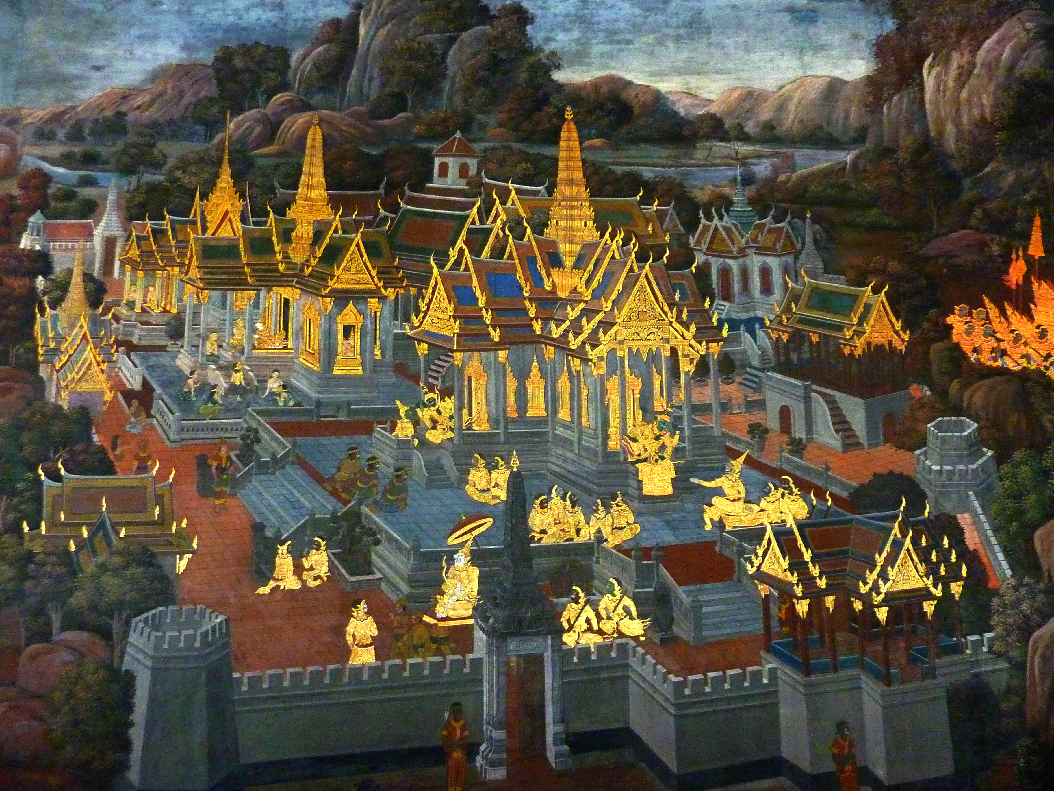 Wat Phra Kaew, Bangkok